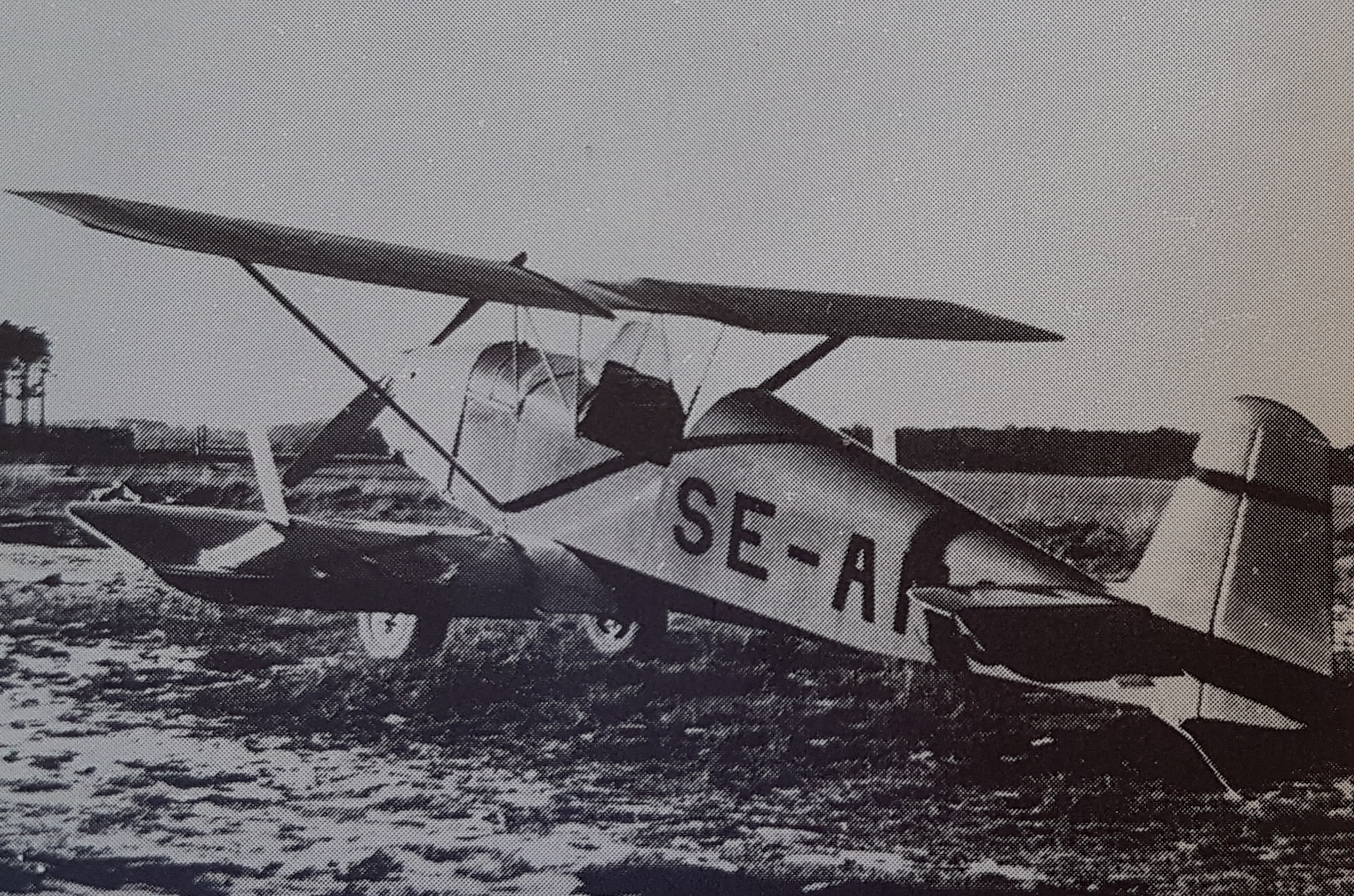 SE-ANS Ba-4 Midget